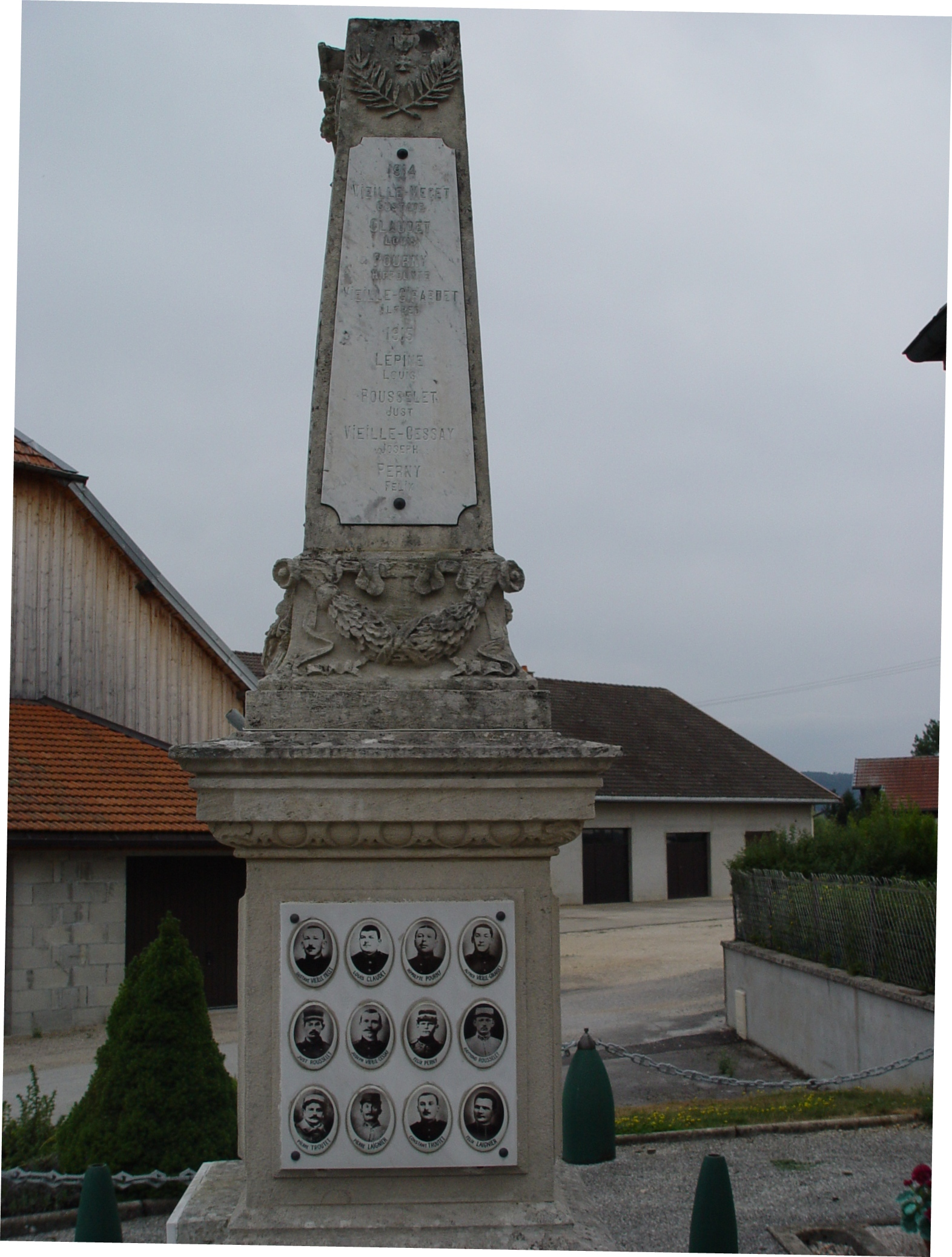 Monument aux morts de Bannans, Doubs, France avec les photos des défunts